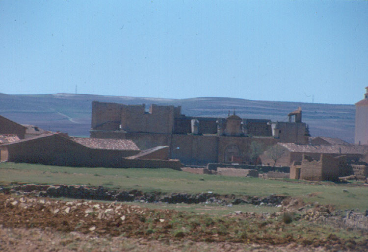 Vista panorámica - Villardefrades (Valladolid) - Diapositiva 48 x 48 Color